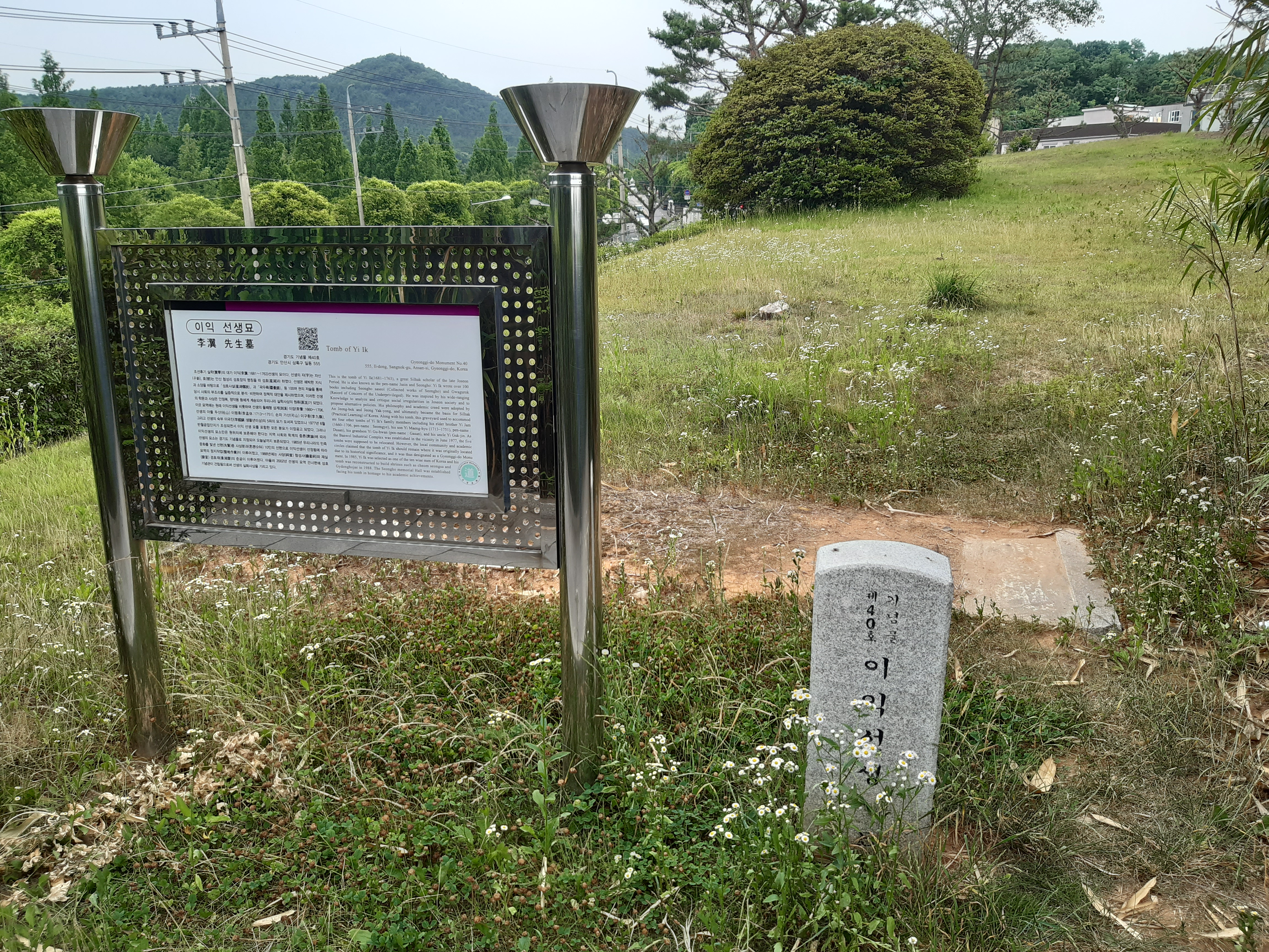 이익선생의 묘